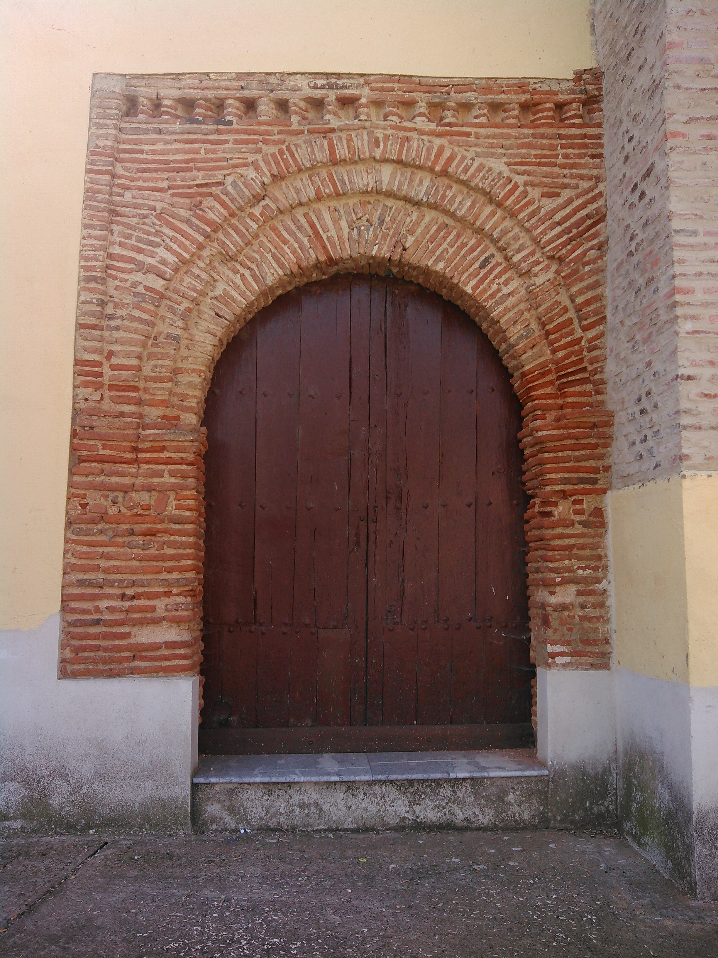 Portal en la nave norte de la Iglesia Parroquial de San Pedro Apóstol en Villademor de la Vega (León).